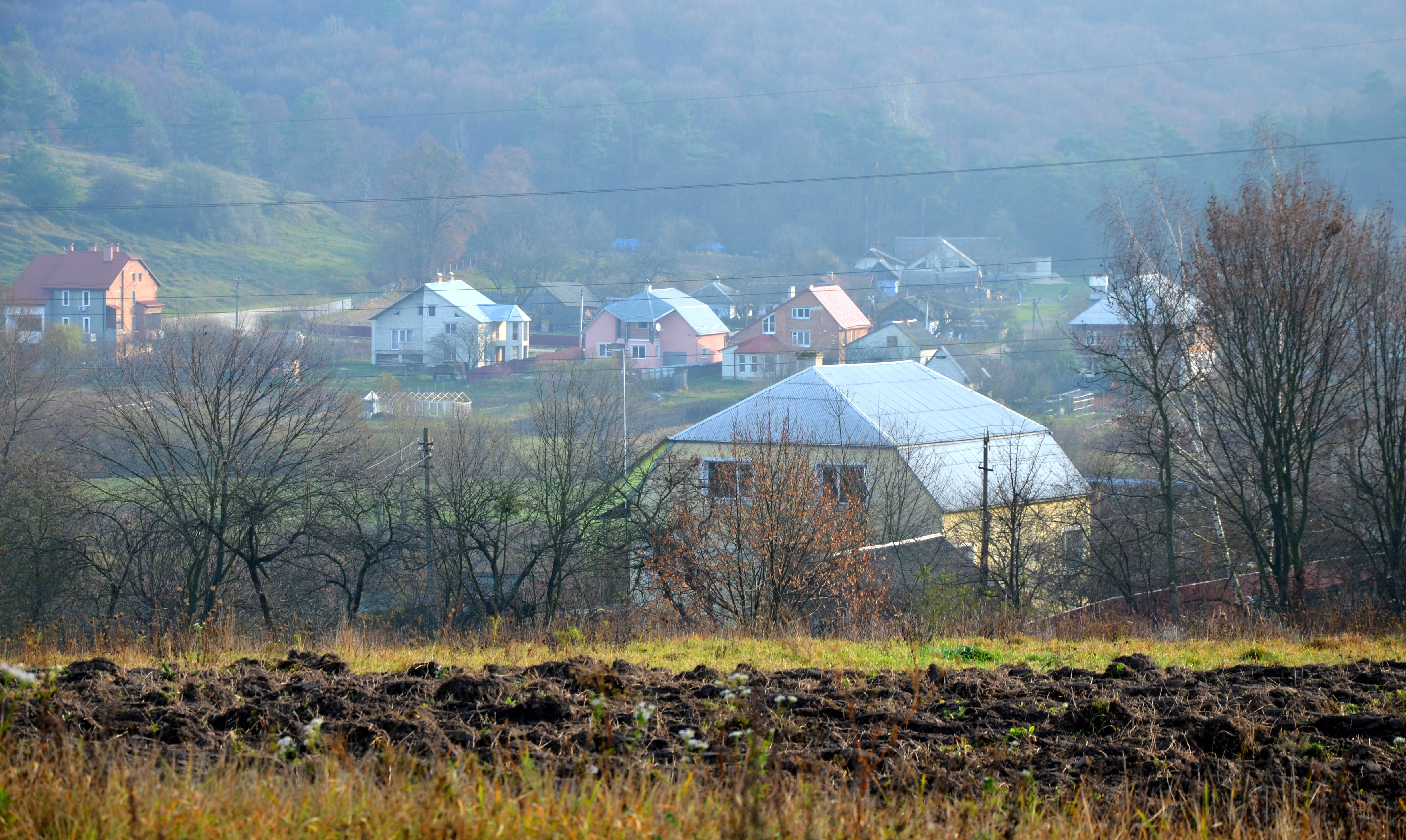 Село Красів Миколаївського району.